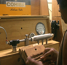 Machine qui teste le tirage d'un Habanos (cigare cubains)